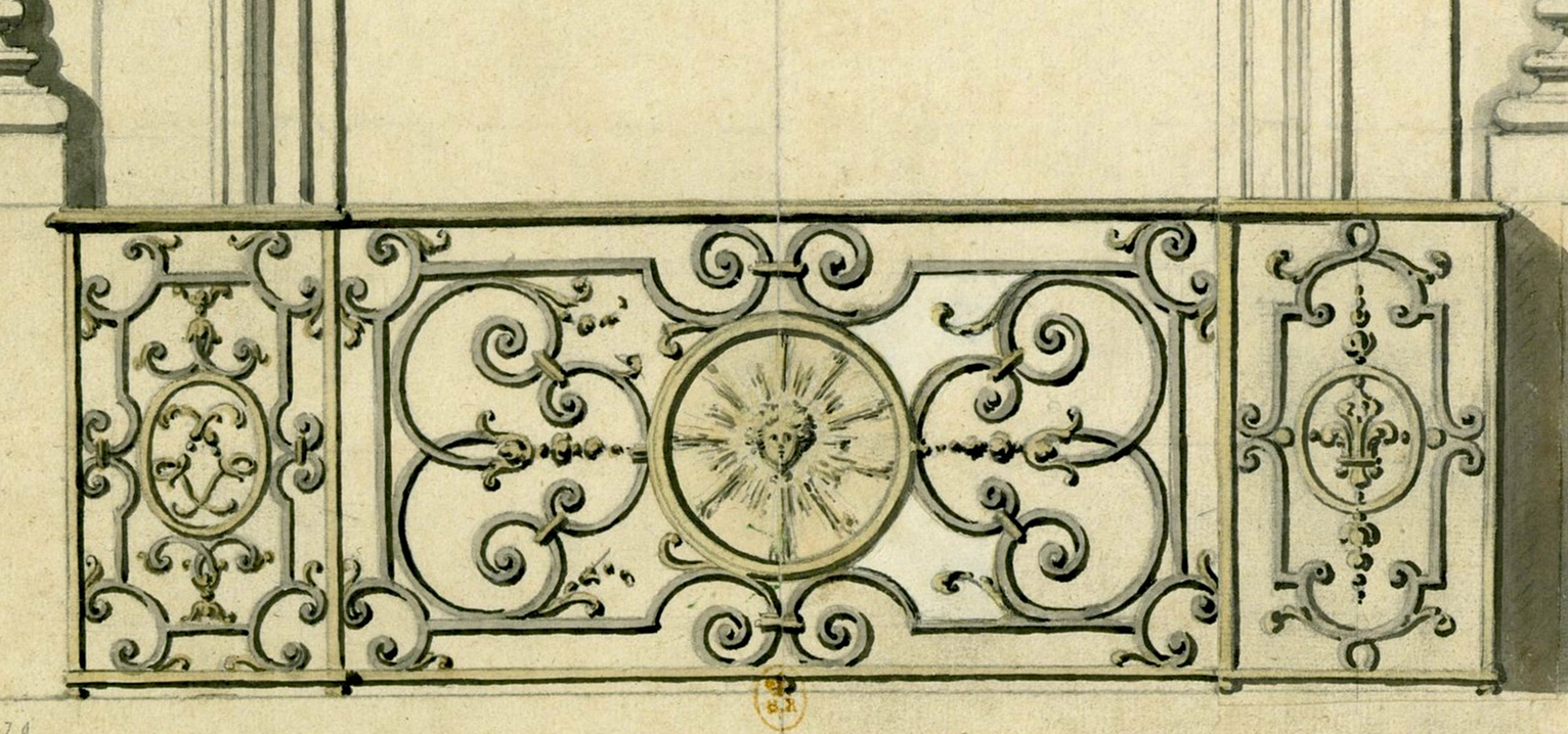 Modèle de garde-corps dessiné par Jules Hardouin-Mansart pour les balcons de la place Vendôme (La place Vendôme. Art, pouvoir et fortune, Paris, 2002, p.84-85).